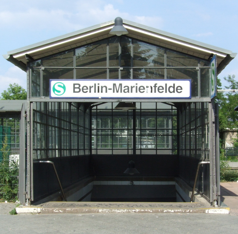 Der Zugang zum S-Bahnhof Marienfelde in Berlin-Marienfelde Fotograf: Harald Rossa Datum: Juni 2006 Höher aufgelöste Version ist verfügbar